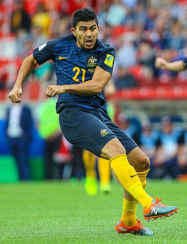 Чили - Австралия